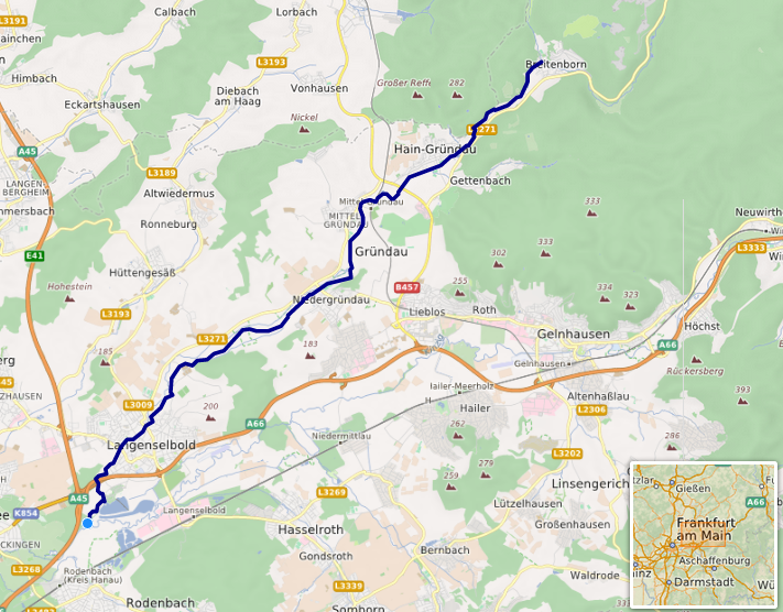 carte réalisée sur umap This map may be incomplete, and may contain errors. Don't rely solely on it for navigation.